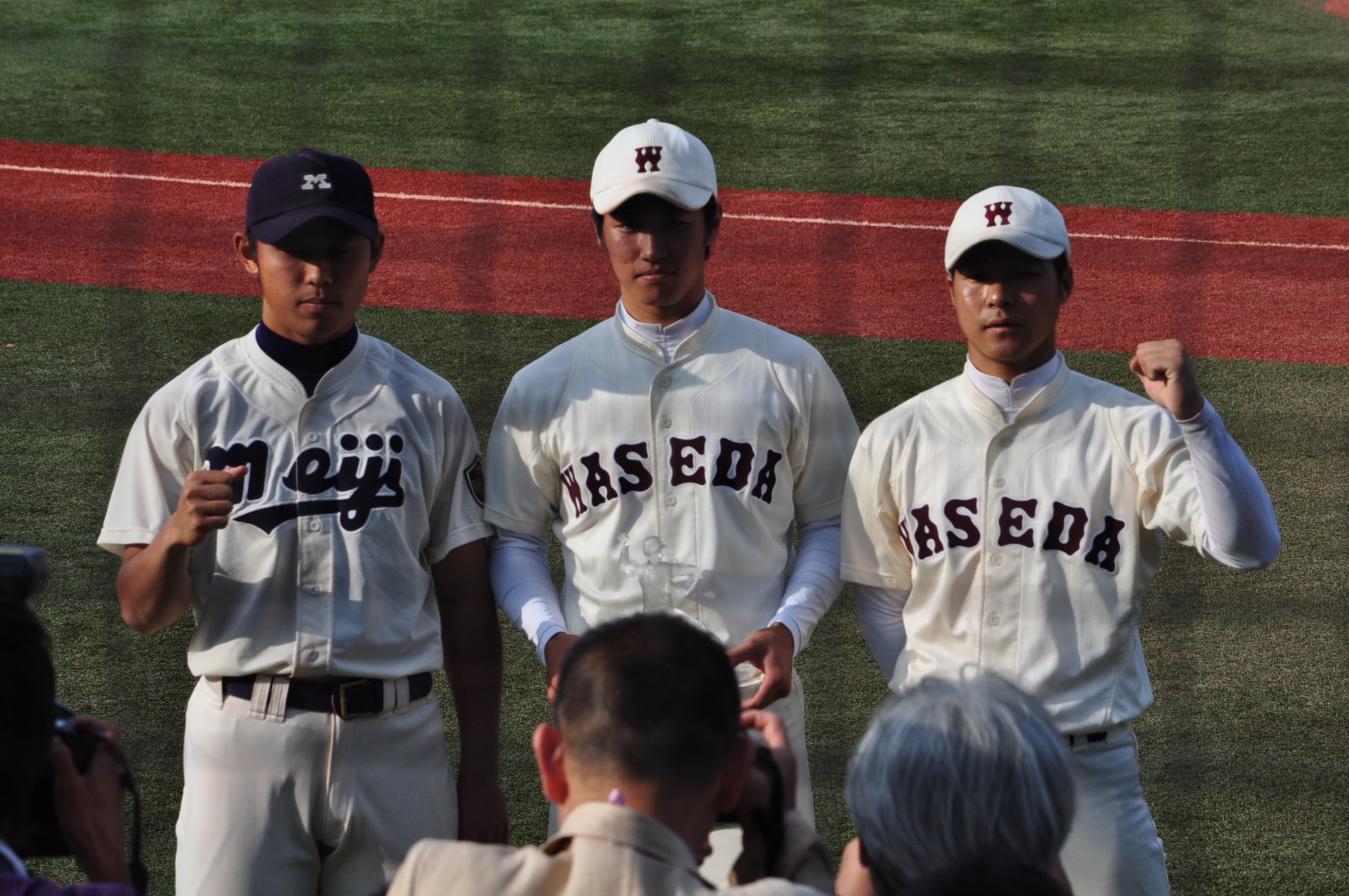 東京六大学野球 高山俊、吉永健太郎、茂木栄五郎